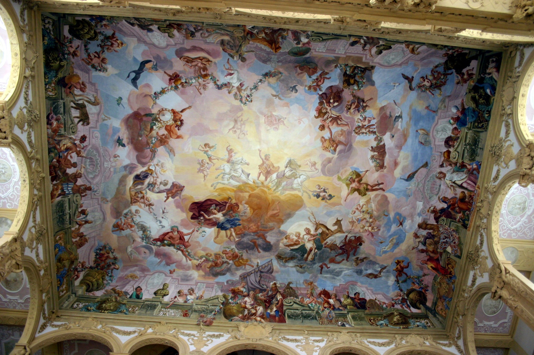 Schloss Weißenstein (Pommersfelden), Deckenfresko im Treppenhaus von Johann Rudolf Byss und Giovanni Francesco Marchini